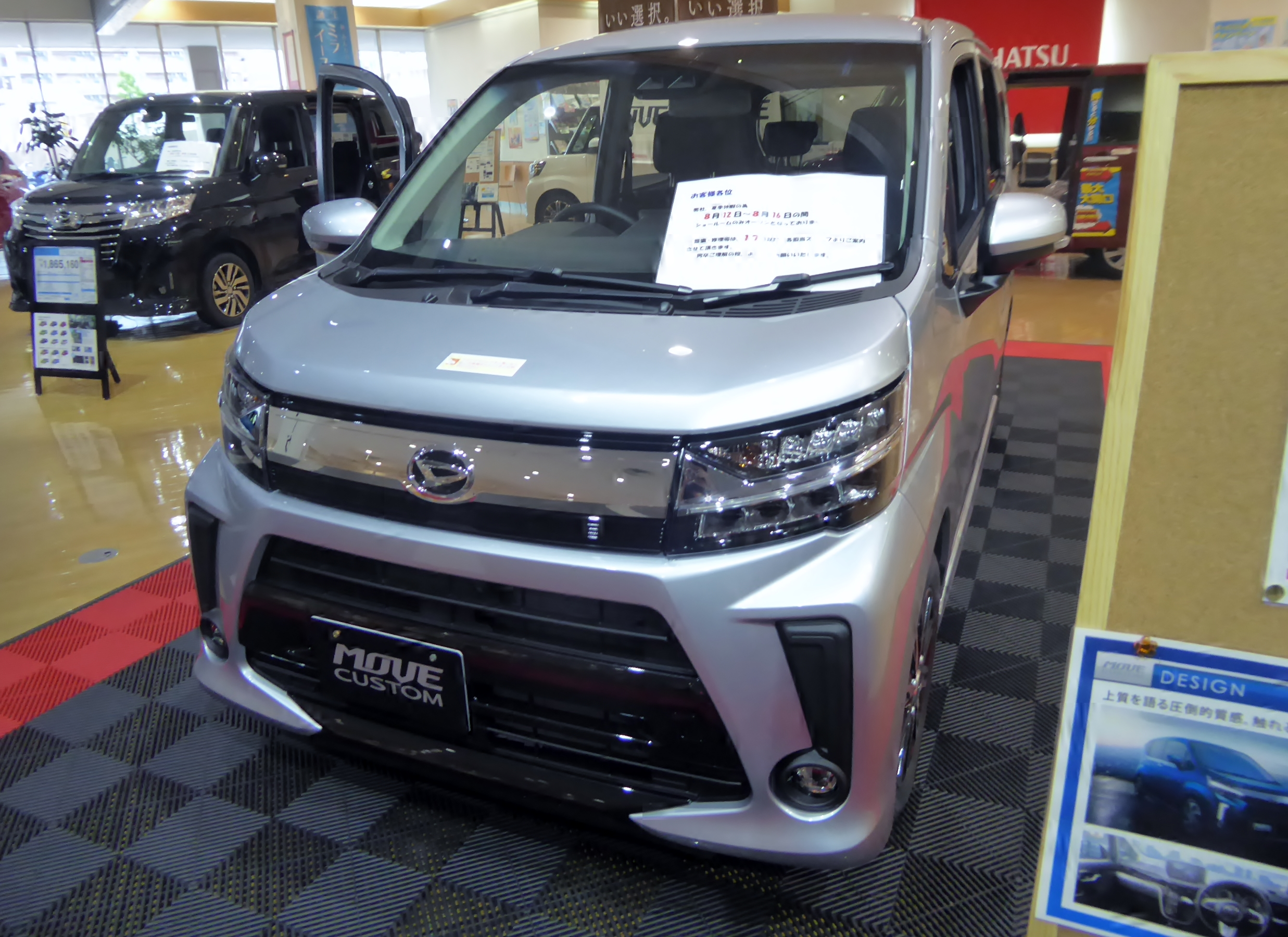 DBA-LA150S-GBVF型ダイハツ・ムーヴカスタムX"Limited SA III"をフロントから撮影。